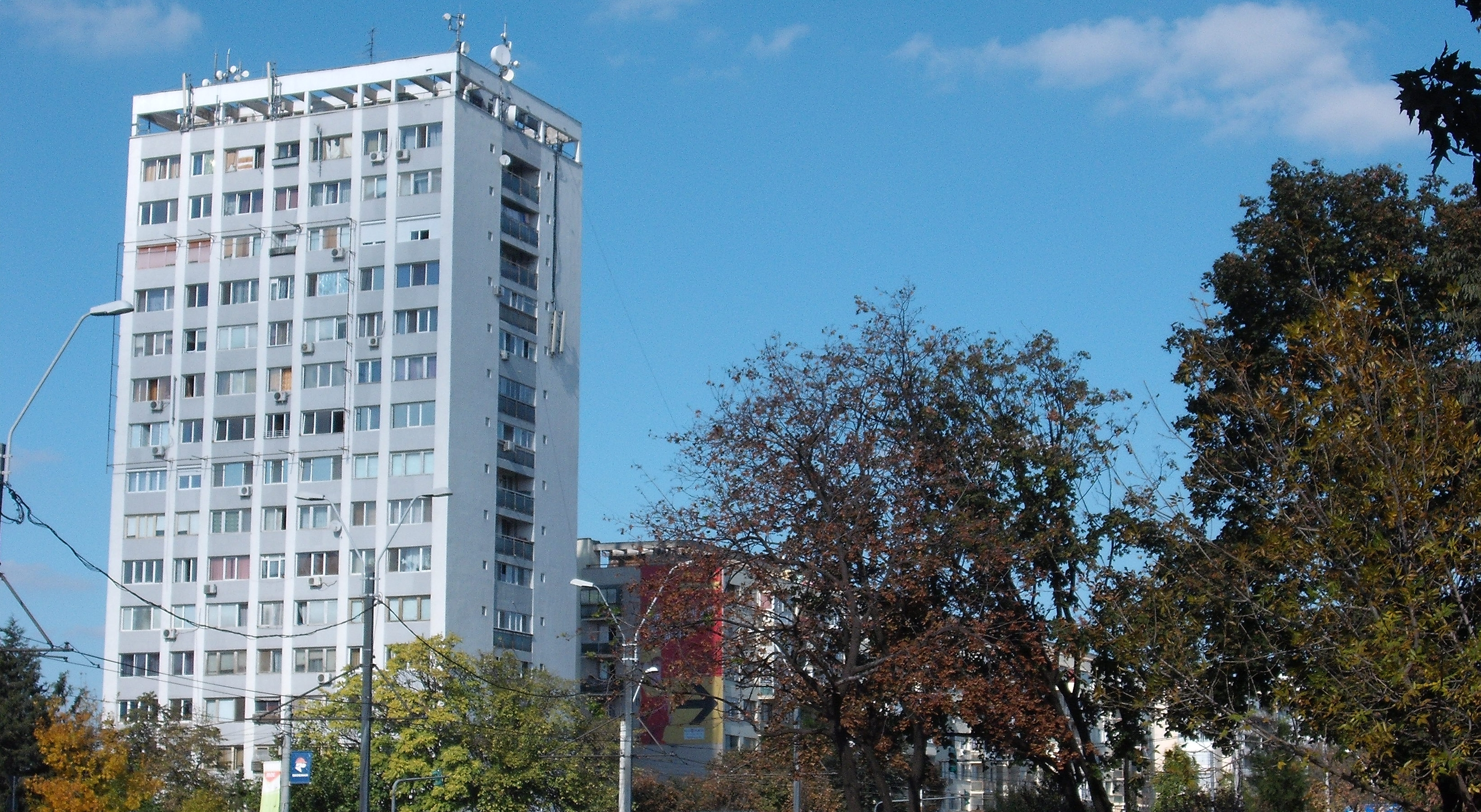 Bloc turn intersectie Toporasi